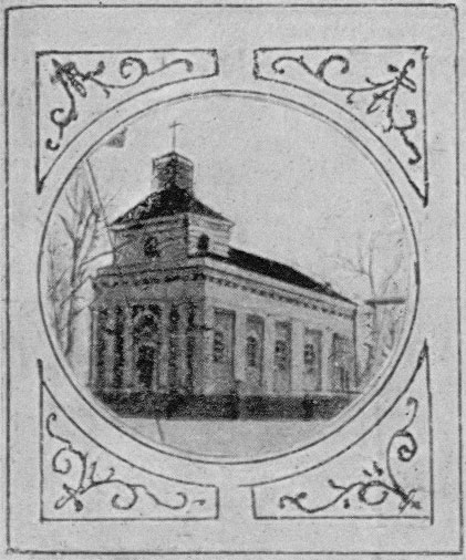 Беларуская (тарашкевіца): Столін (Stolin), пляц Касьцельны (plac Kaścielny). Касьцёл да перабудовы ў расейскім каляніяльным стылі